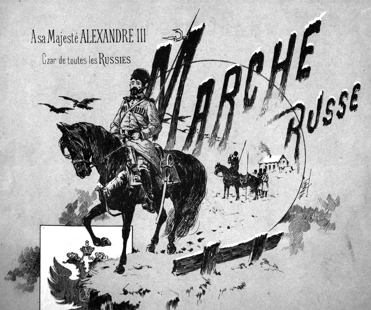 Illustration d'une partition : À sa Majesté Alexandre III Czar de toutes les Russies - Marche Russe, de Louis Ganne - Enoch & Cie édition, Paris